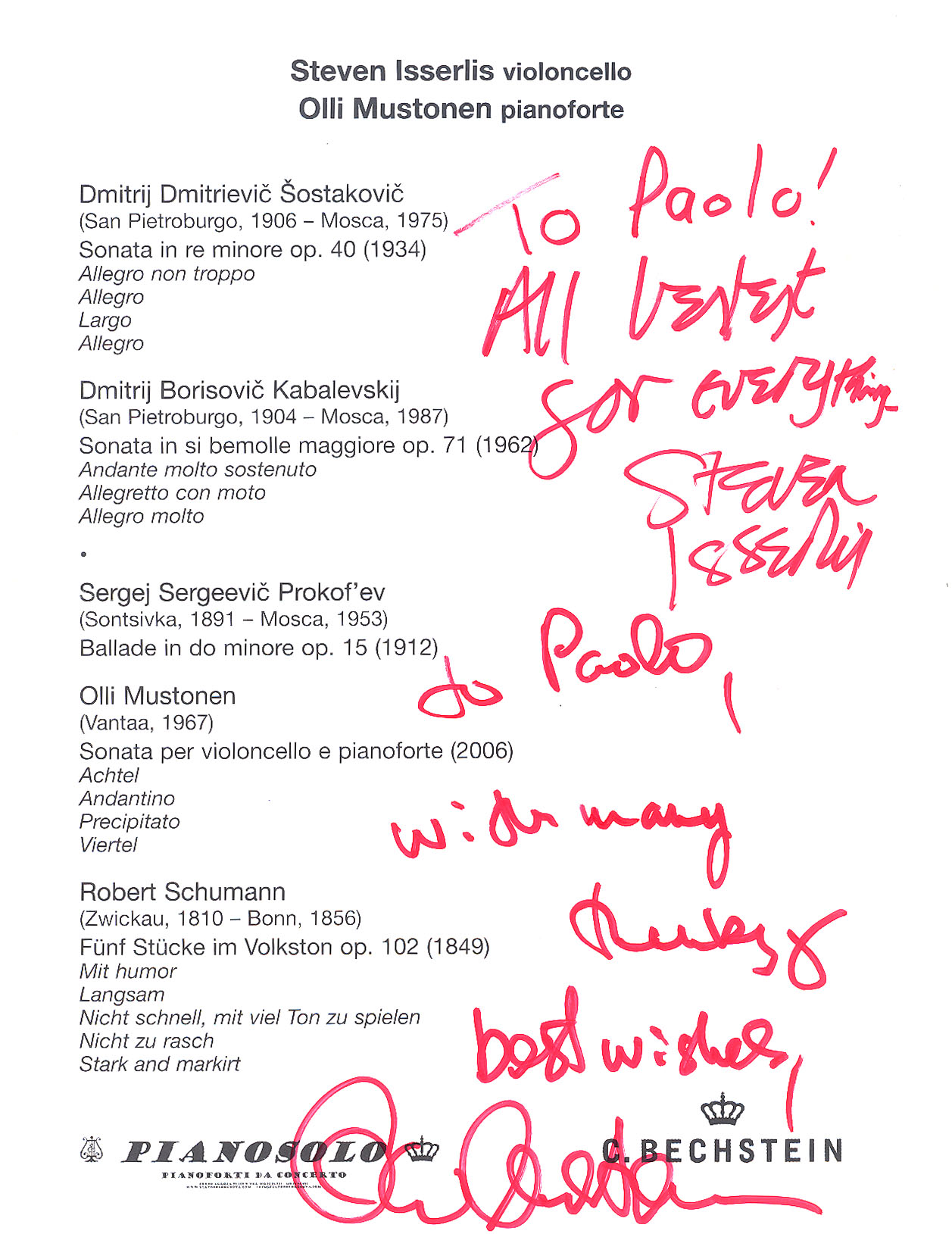 Programma di sala autografato: Steven Isserlis-Olli Mustonen, Genova, Teatro Carlo Felice 15.01.2018